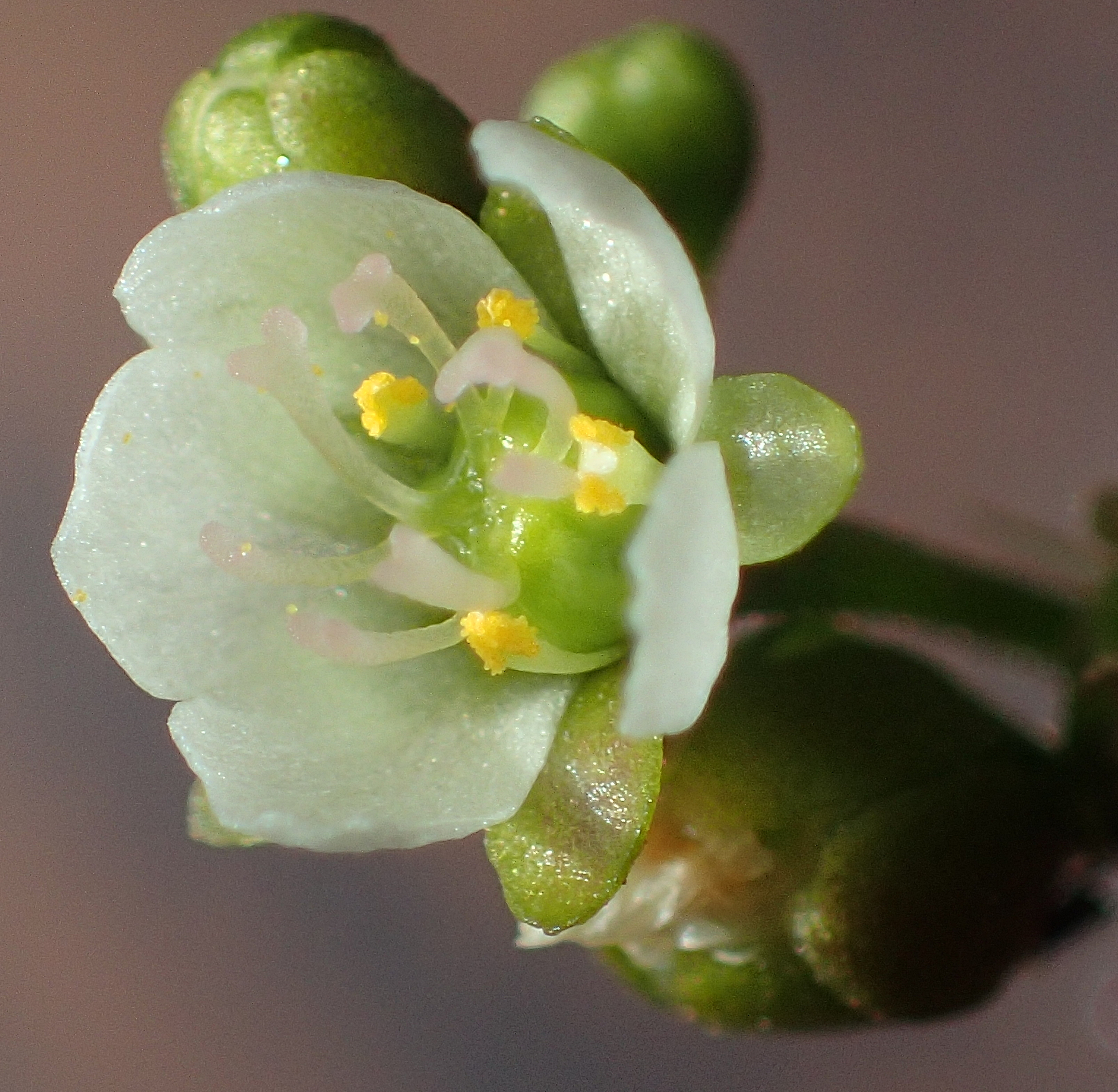 Blüte von Drosera intermedia aus Deutschland, Brandenburg, Naturpark Niederlausitzer Heidelandschaft am 6. August 2017